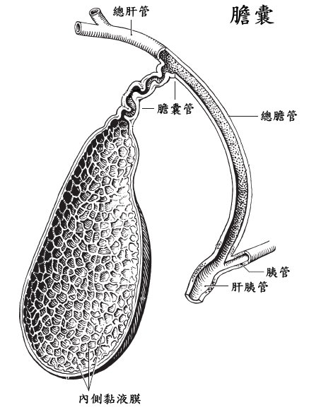 gallbladder